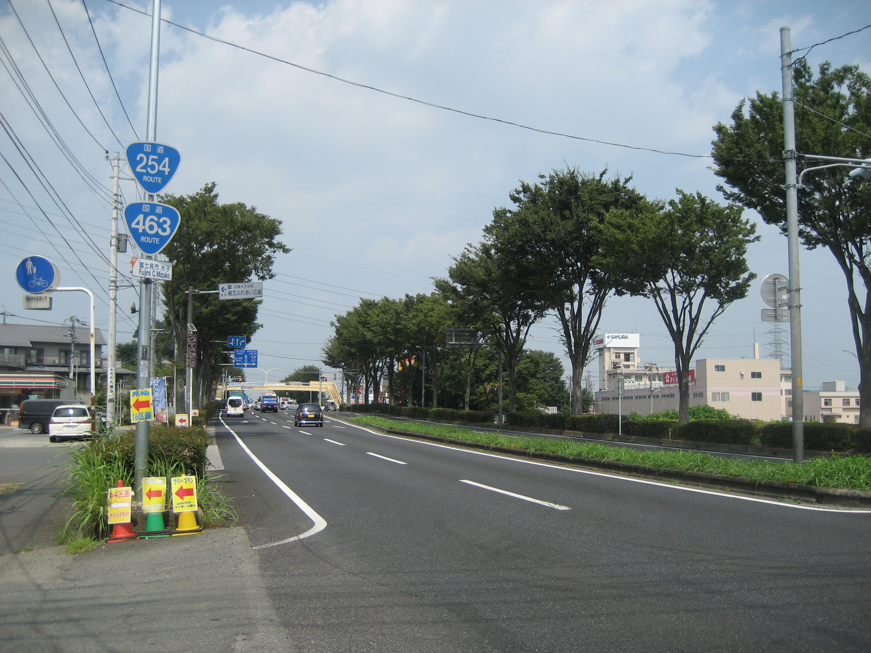 国道463号線浦和所沢バイパス富士見市水子付近（さいたま方面を撮影）